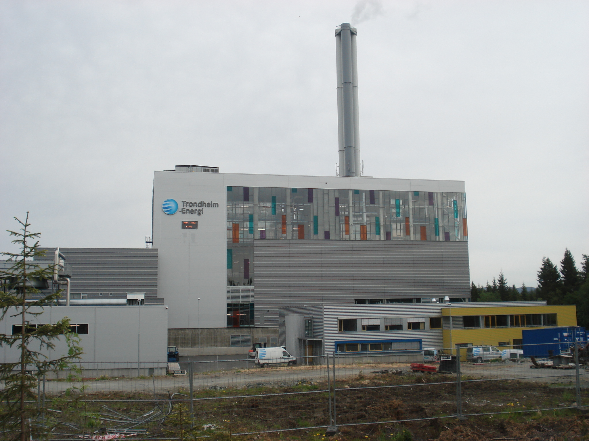 Trondheim Energi Fjernvarme som ligger på Tiller